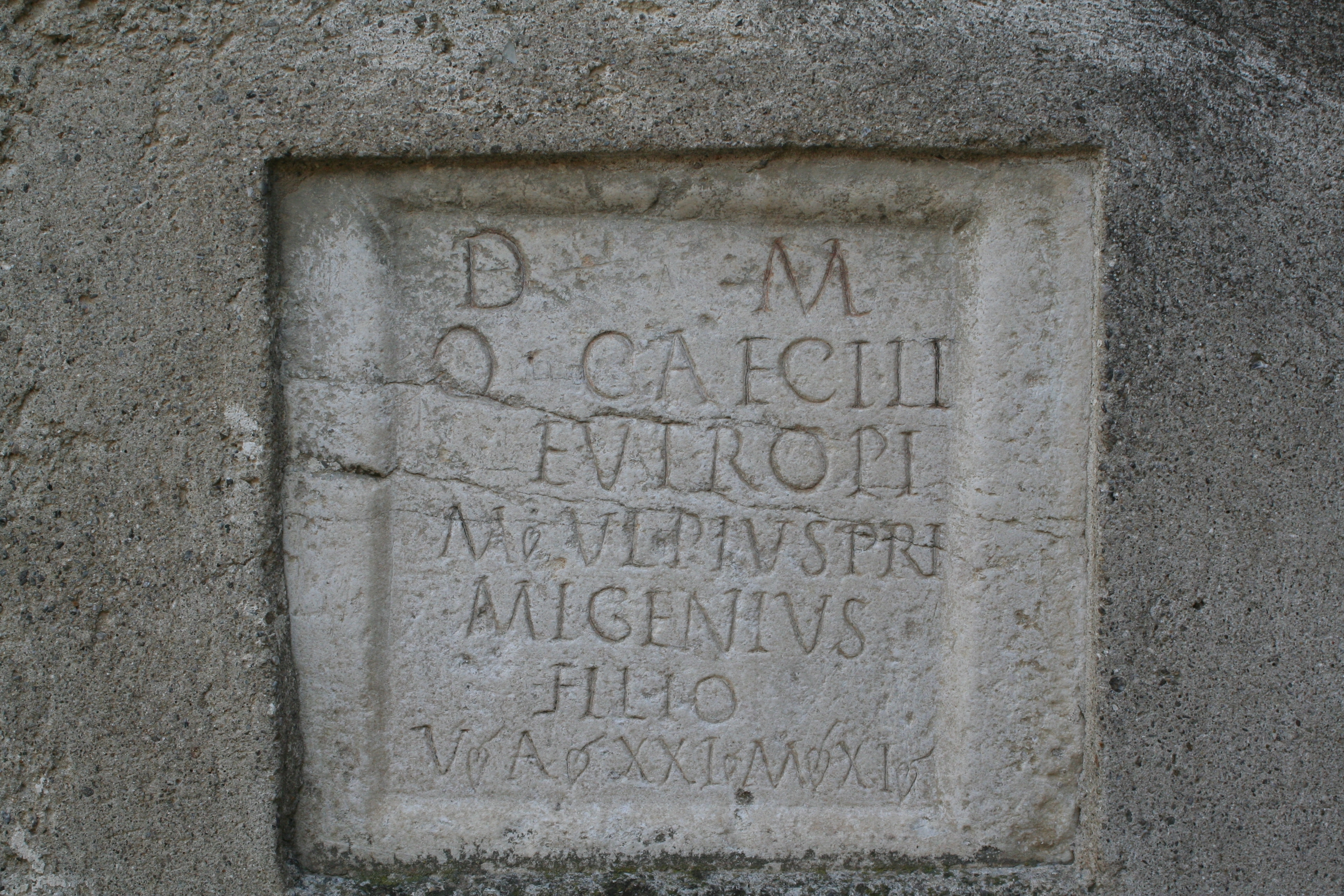 Römischer Grabstein beim Hochhueb in Partschins (Südtirol)